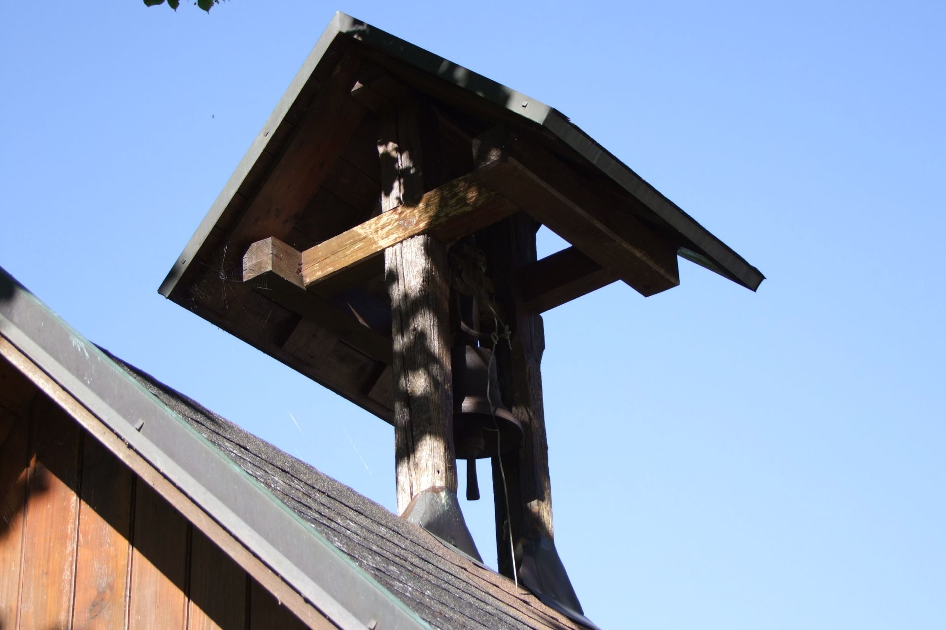 Mariahilf-Kapelle